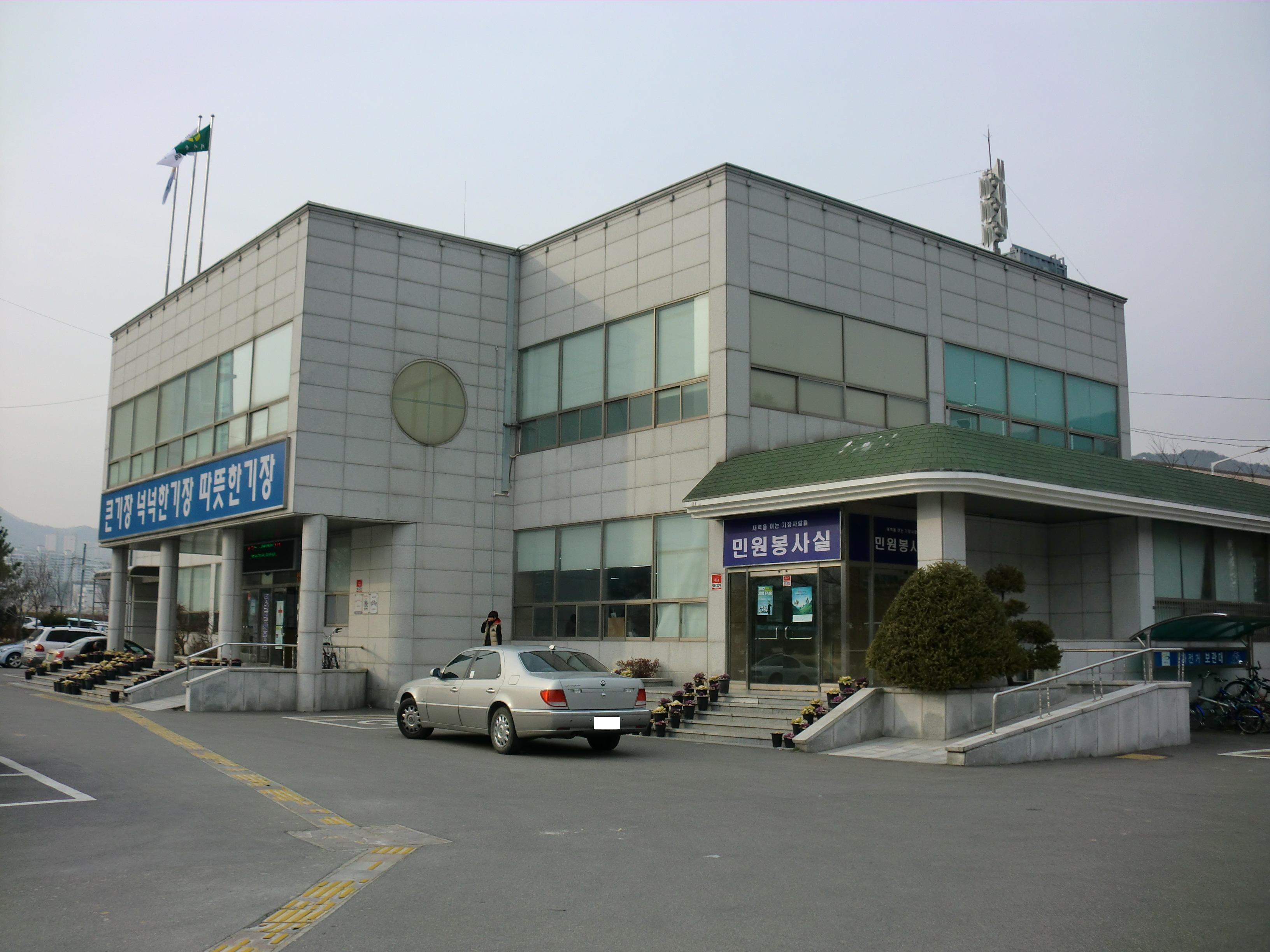 부산광역시 기장군 정관면에 있는 정관면사무서